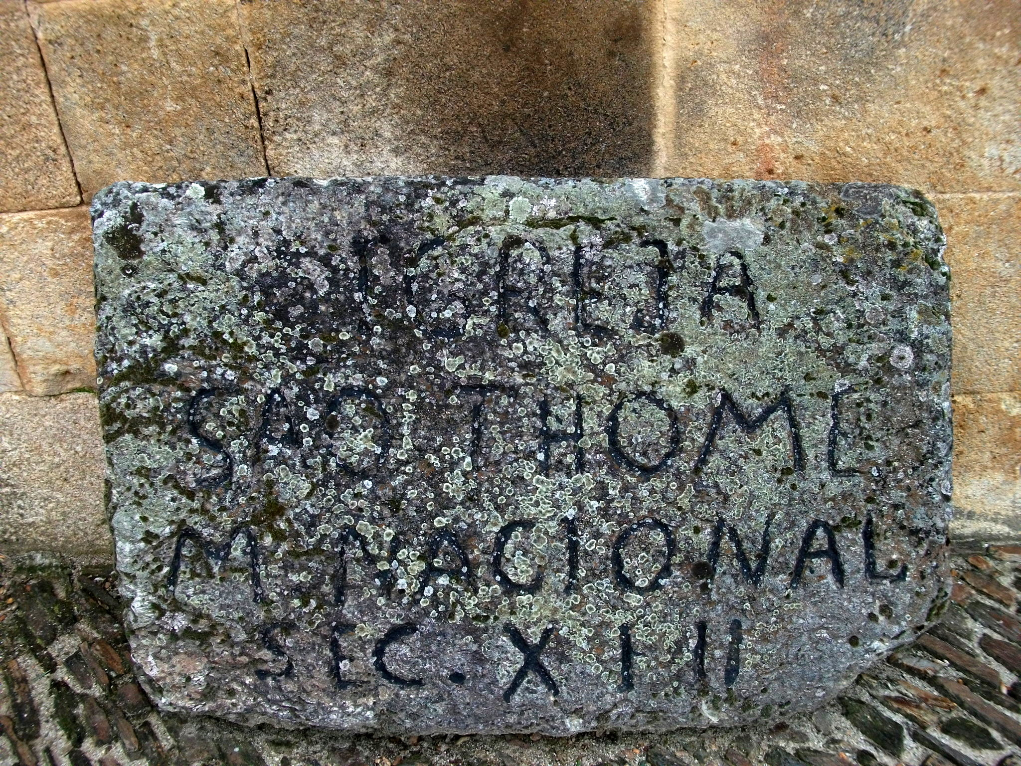 Pormenor da Igreja de São Tomé, em Abambres, Mirandela.